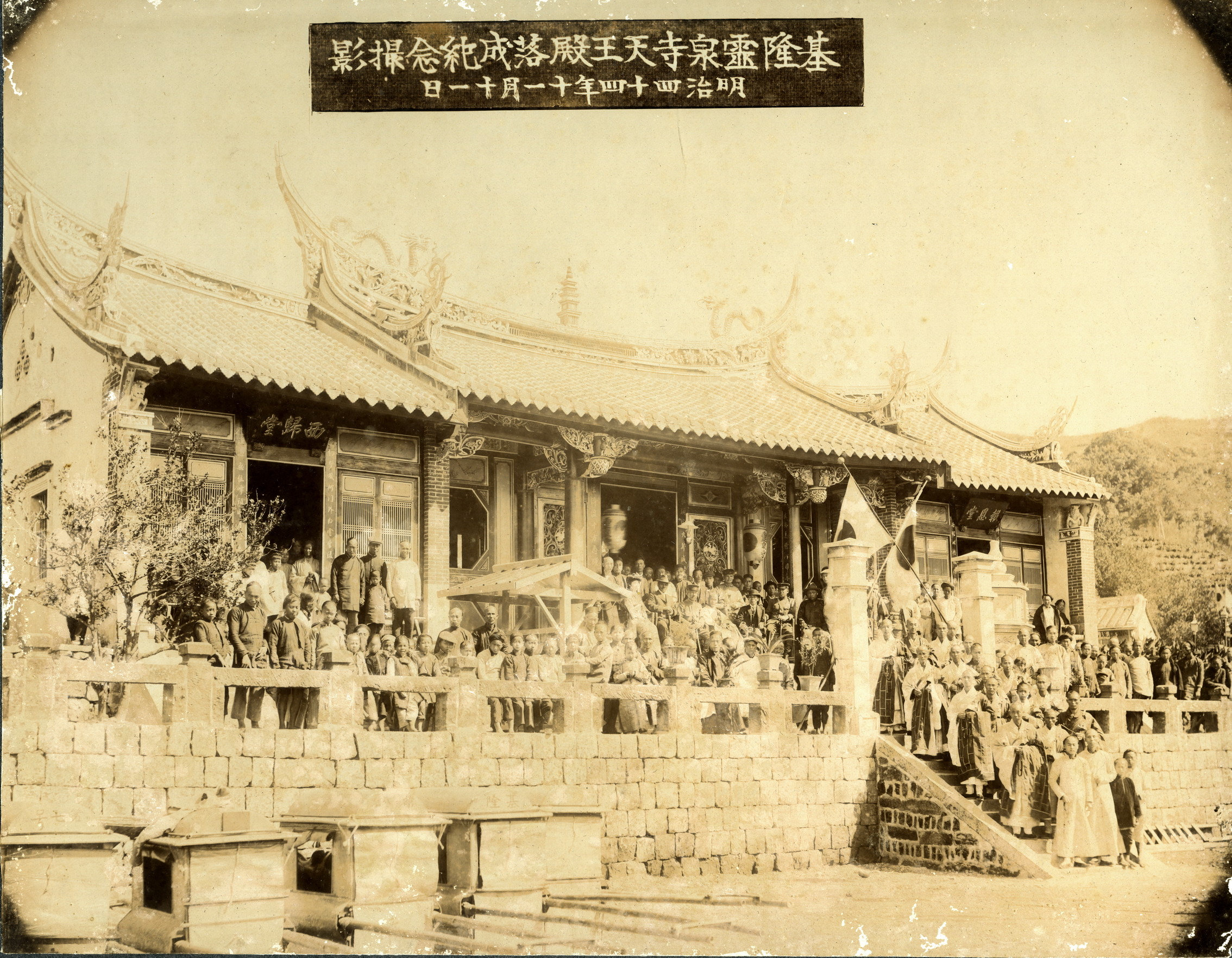 基隆靈泉寺天王殿落成紀念攝影。